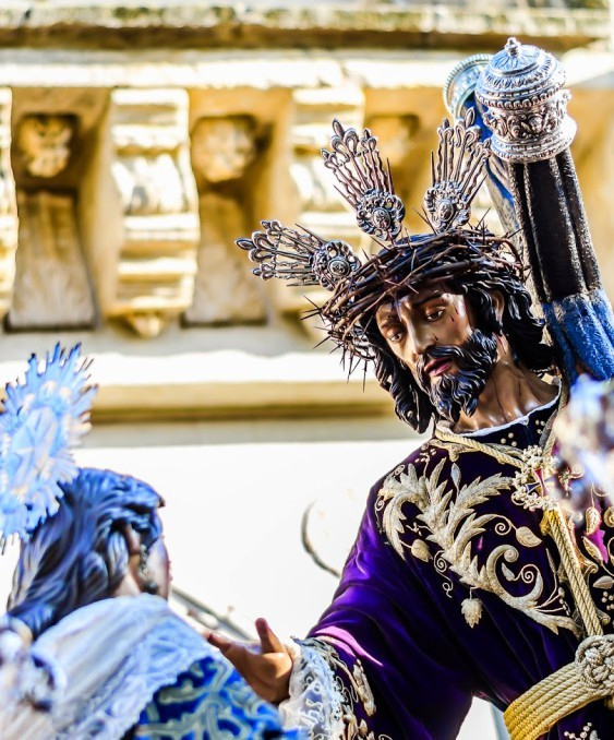 Nuestro Padre Jesús Nazareno en su Encuentro con la Santa Mujer Verónica de Santa Faz